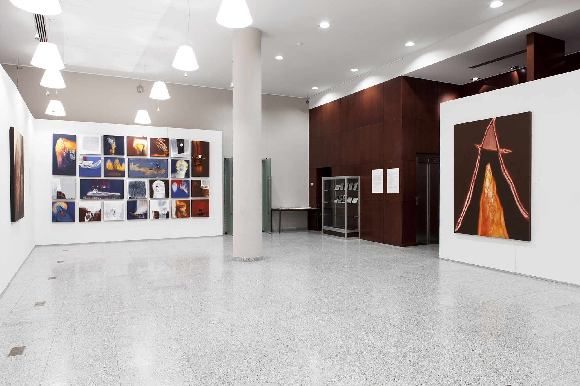 Exposition embassade grecque